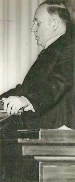 portrett, mann, jurist, dr. juris, stående halvfigur ved talerstol.